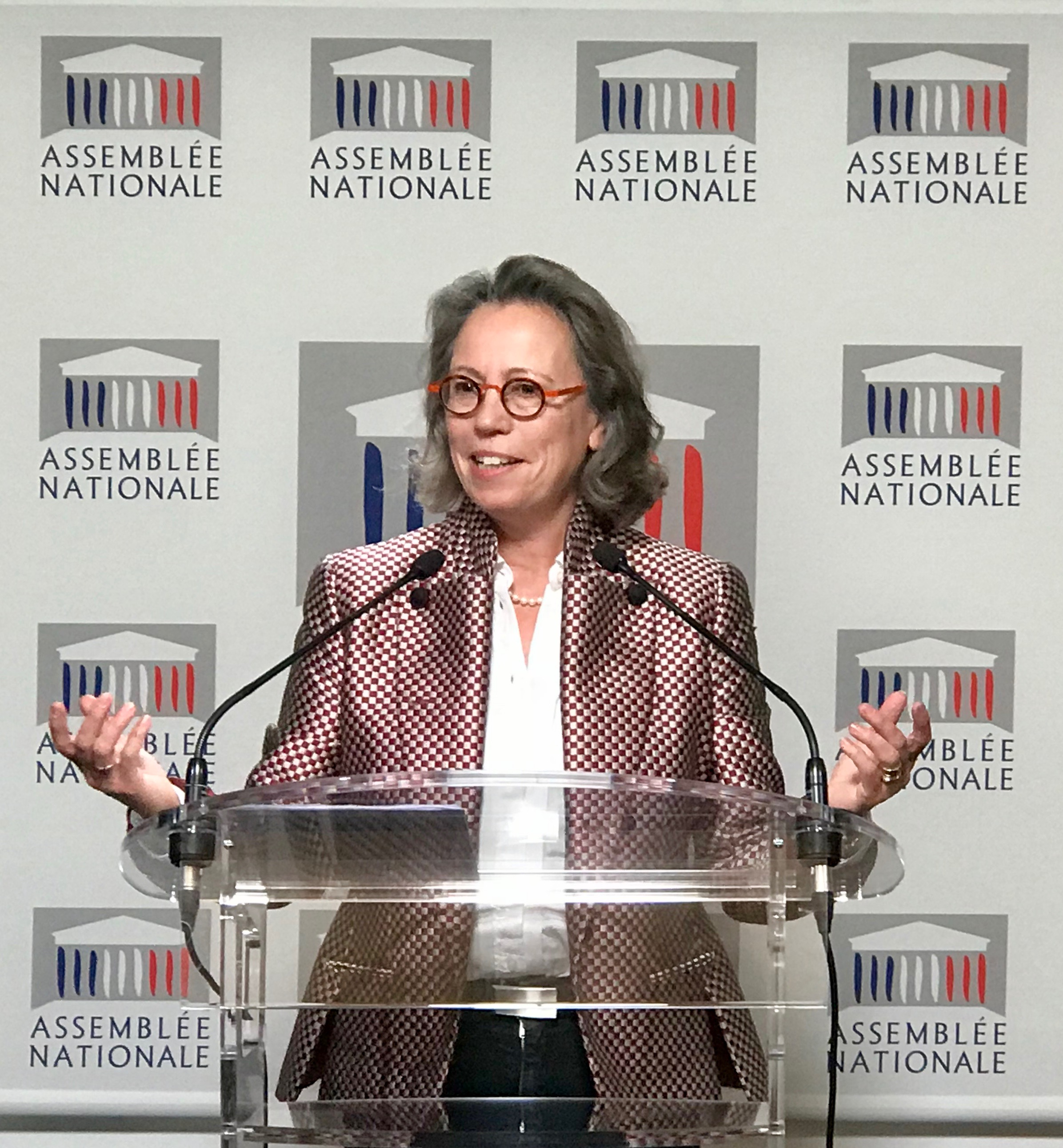 Sabine THILLAYE, à l'Assemblée nationale